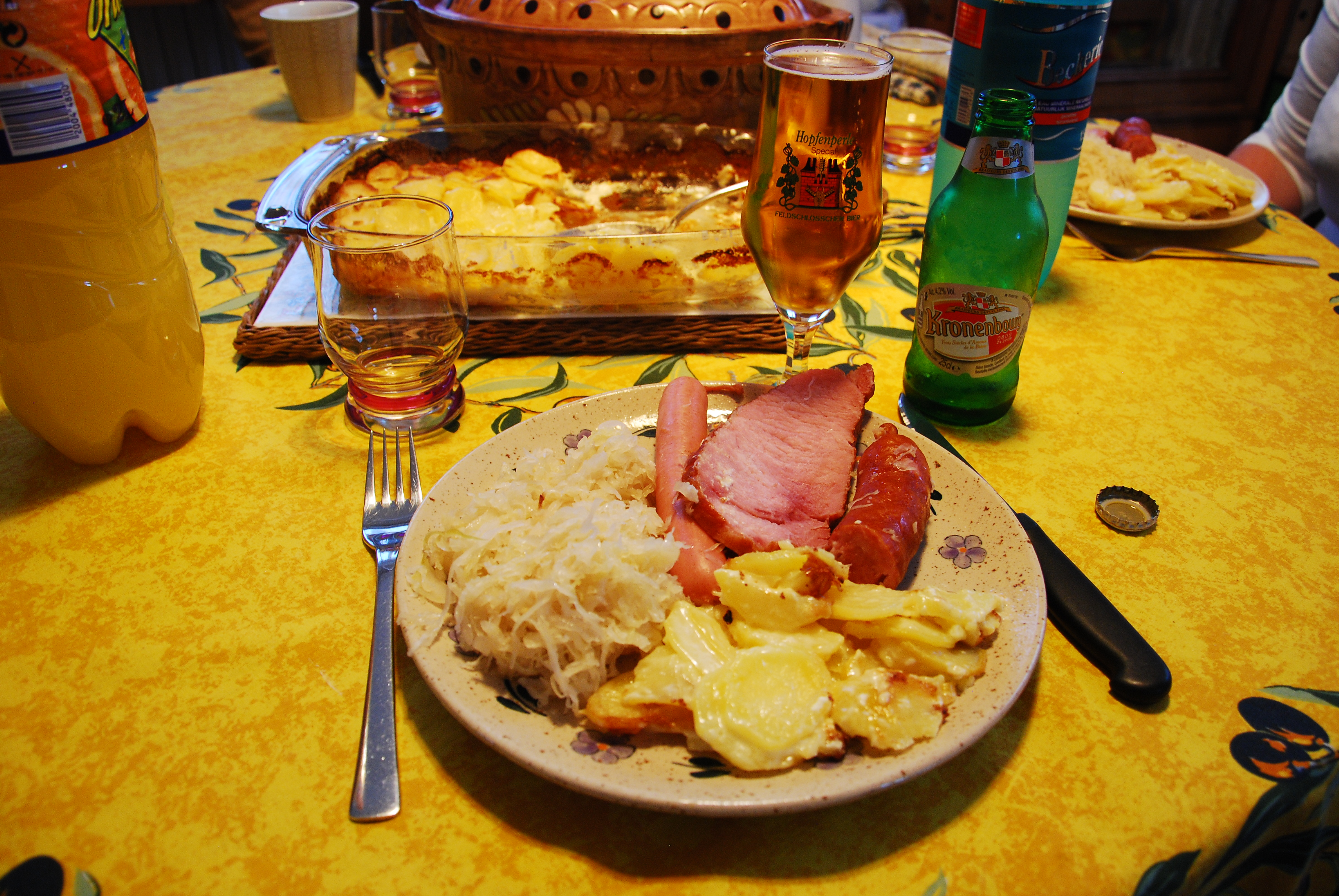 Mmmmm